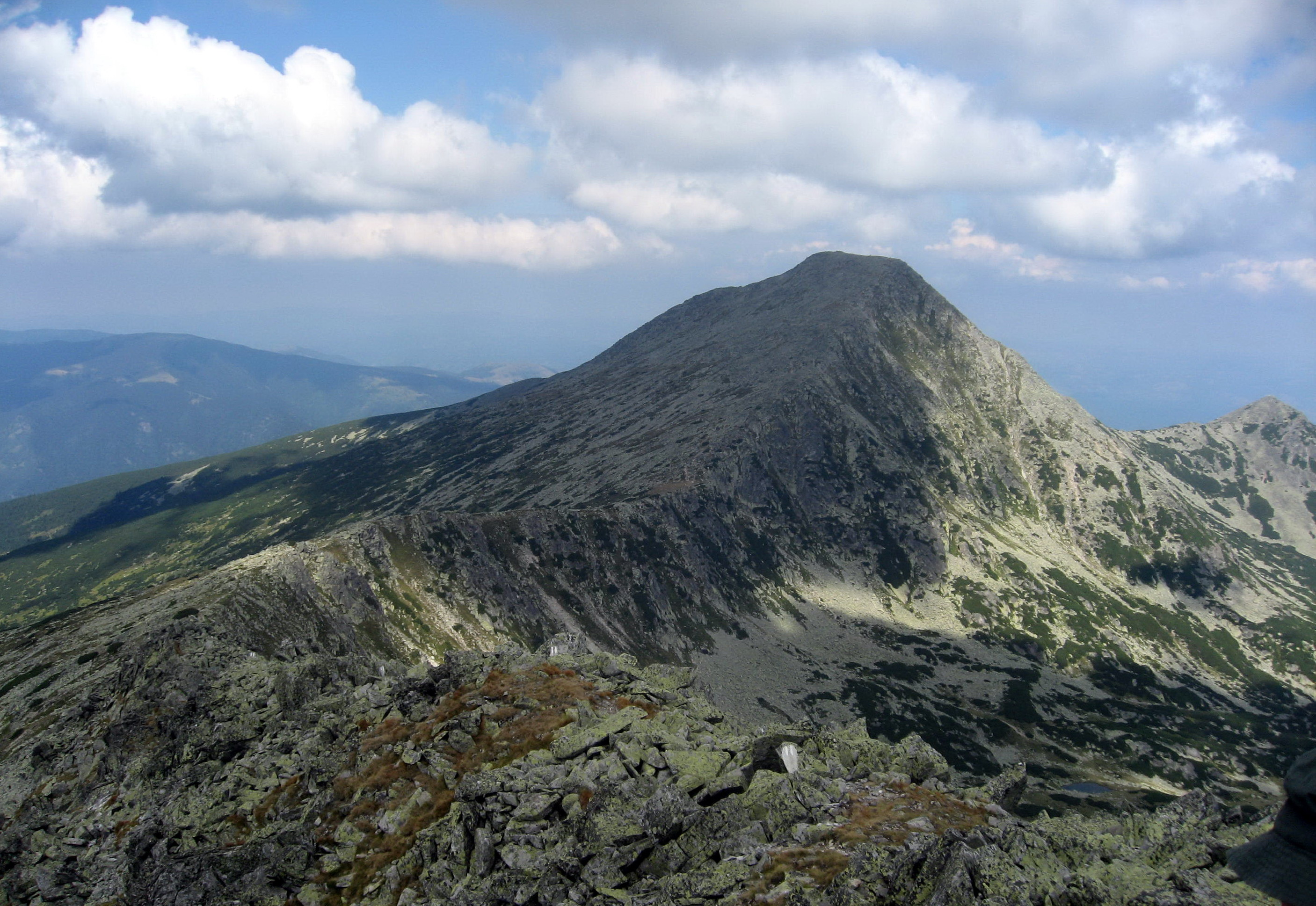 Vârful Retezat